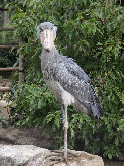 投稿者が上野動物園において撮影。